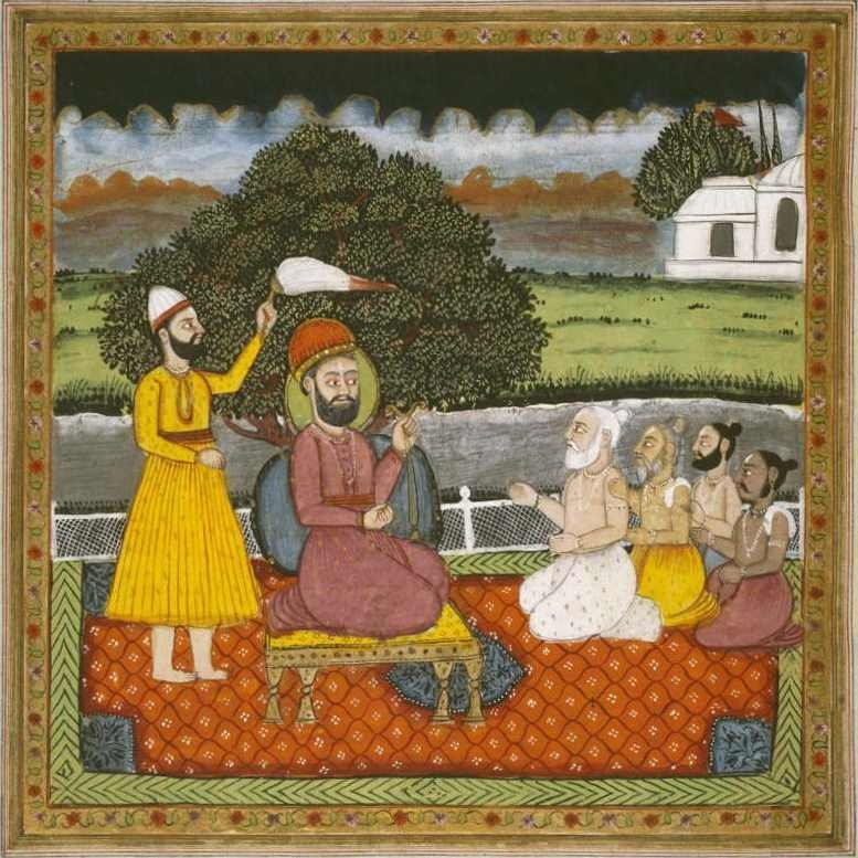 Shows Guru Nanak with Hindu holymen. Regenerated bottom right-hand corner to get rid of the ugly BL stamp.